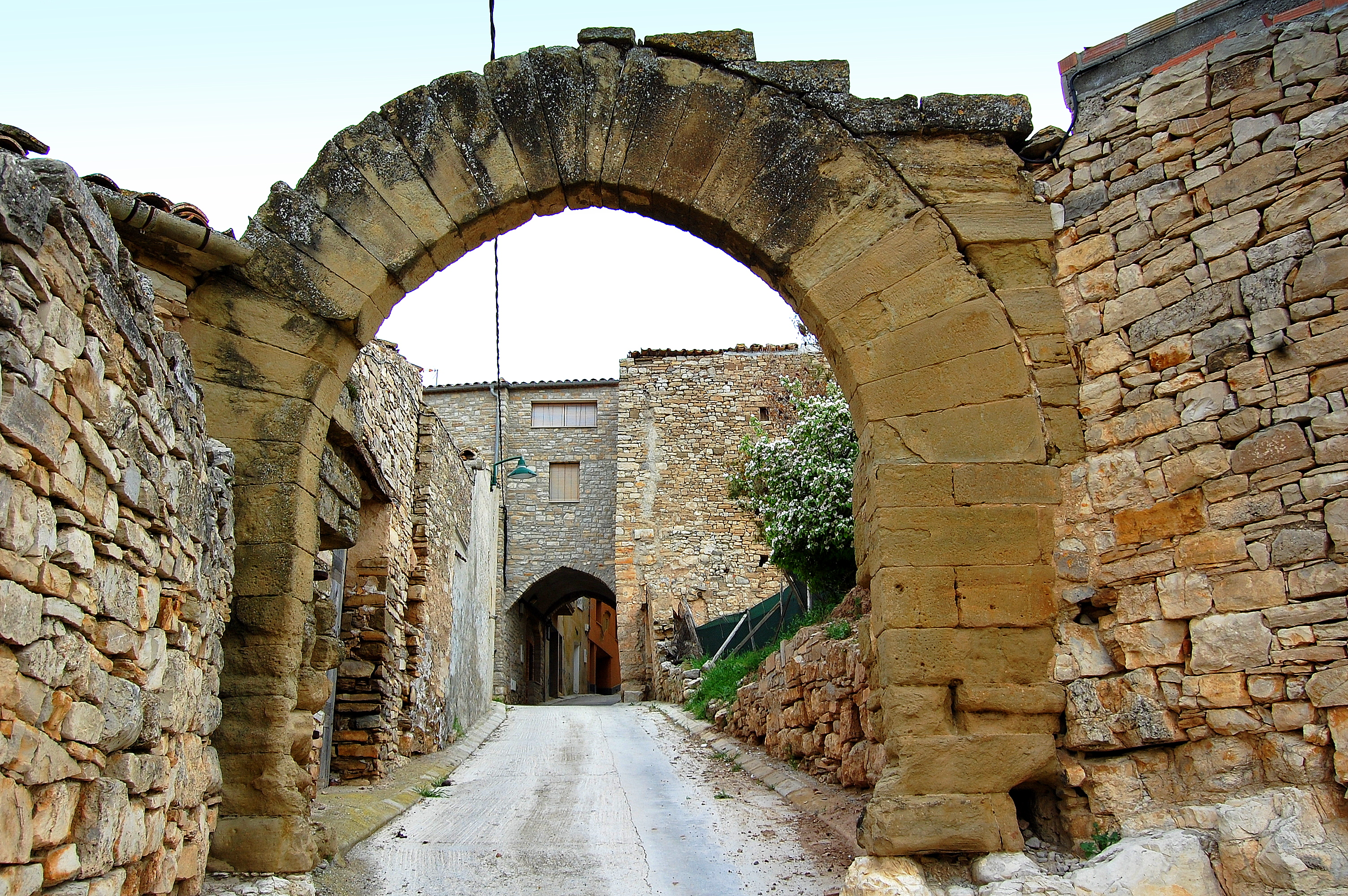 Portals del carrer del Pou (Granyena de Segarra)